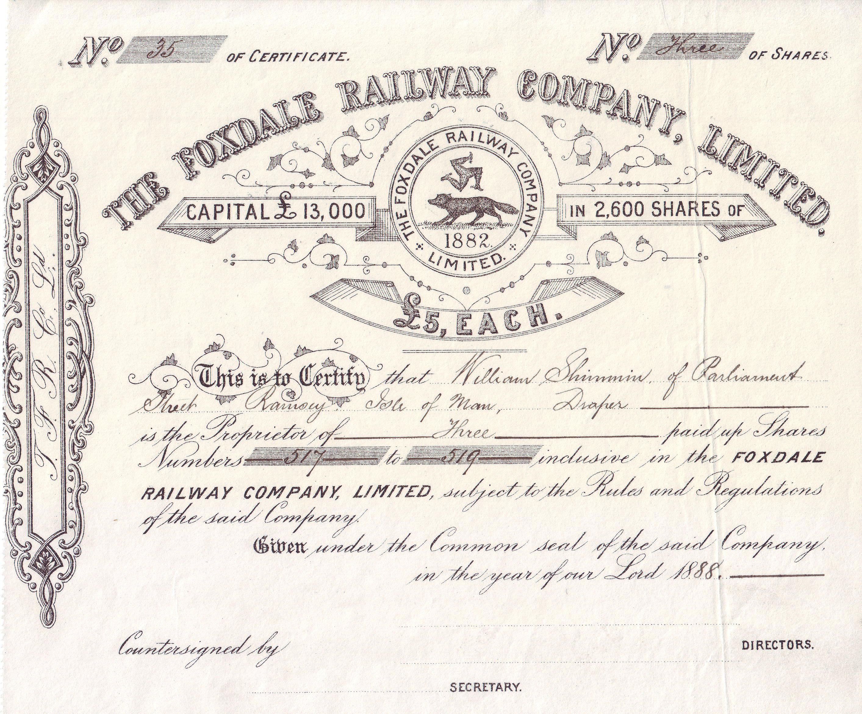 Aktie der Foxdale Railway Company Ltd auf der Isle of Man von 1888